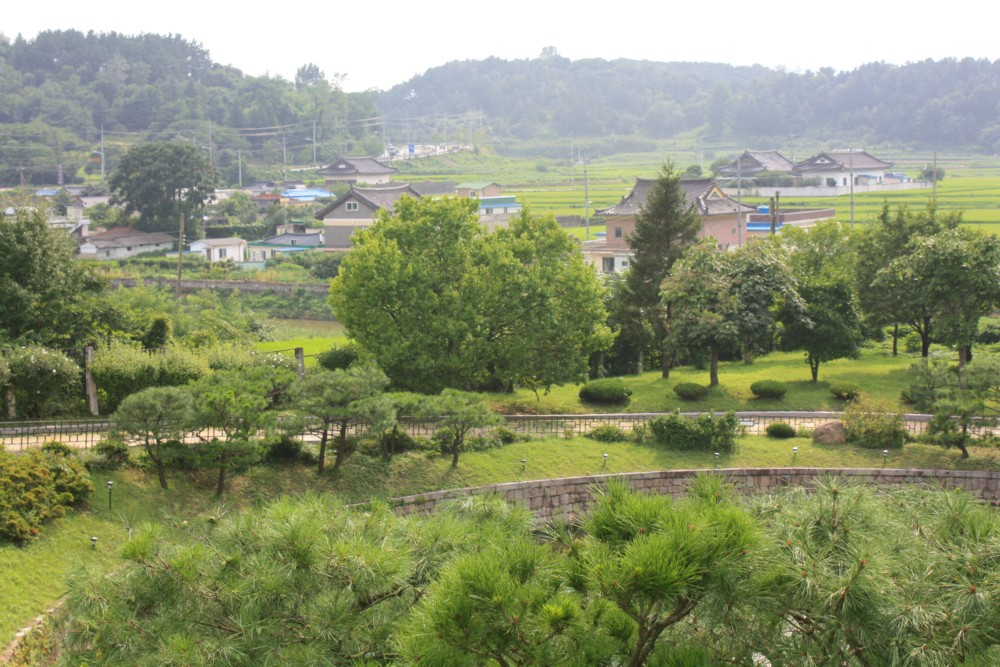 Gyeongju, siehe [1]